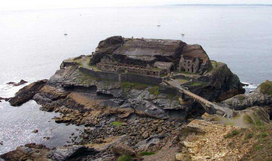 Fort de l'îlot des Capucins (Roscanvel)